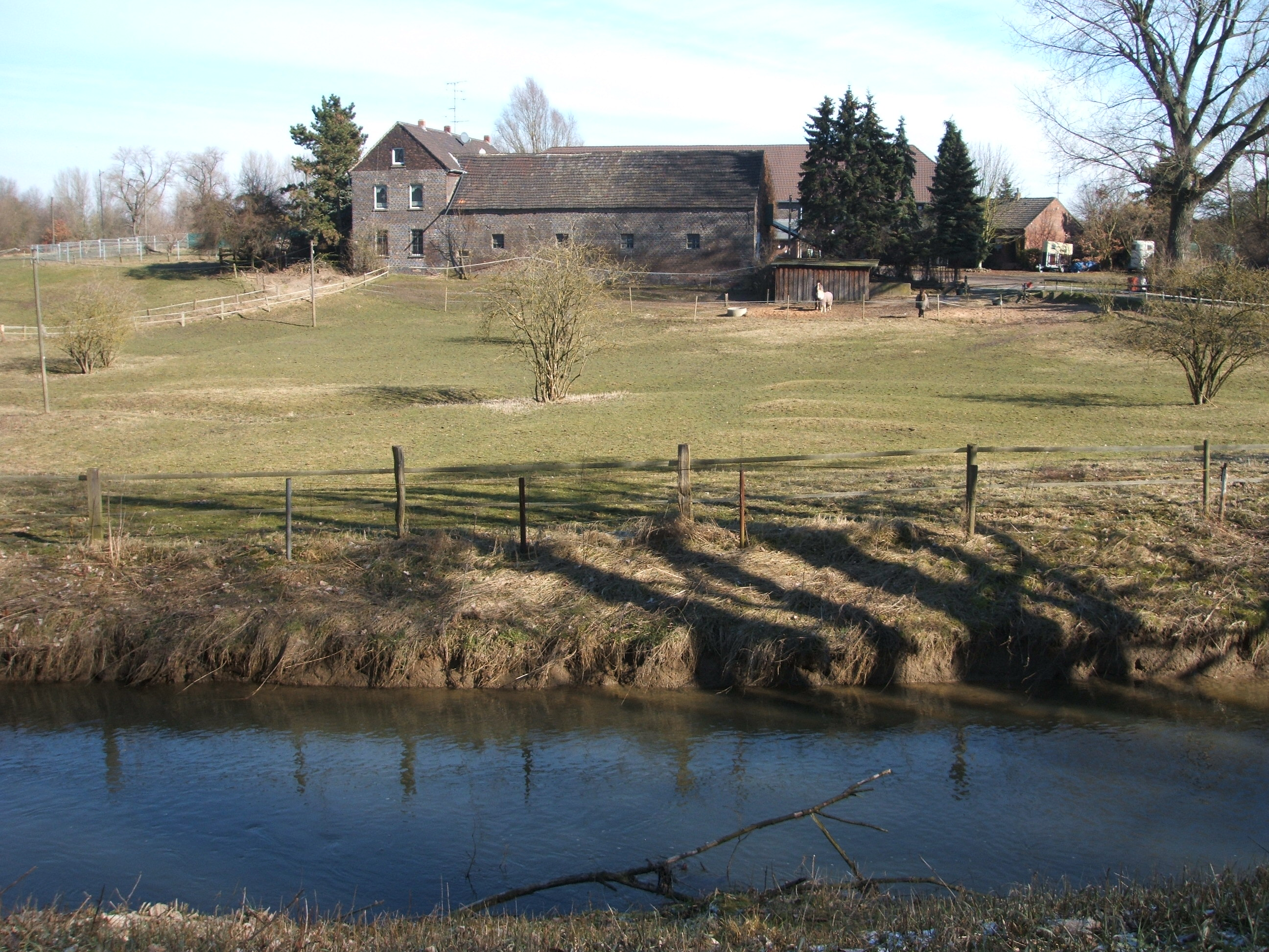 Gut Kesselsberg, Duisburg-Huckingen, Germany